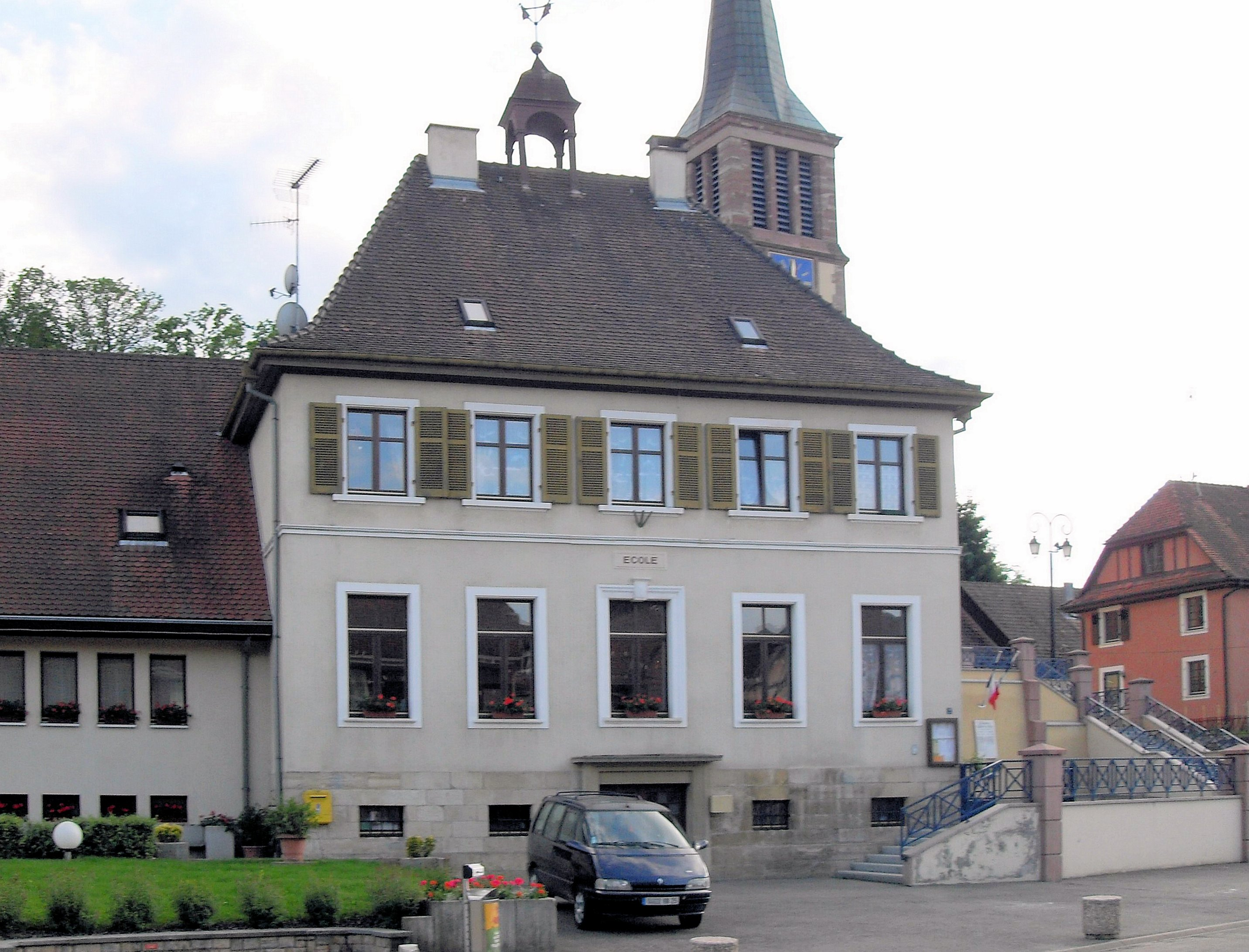 L'école de Seppois-le-Haut